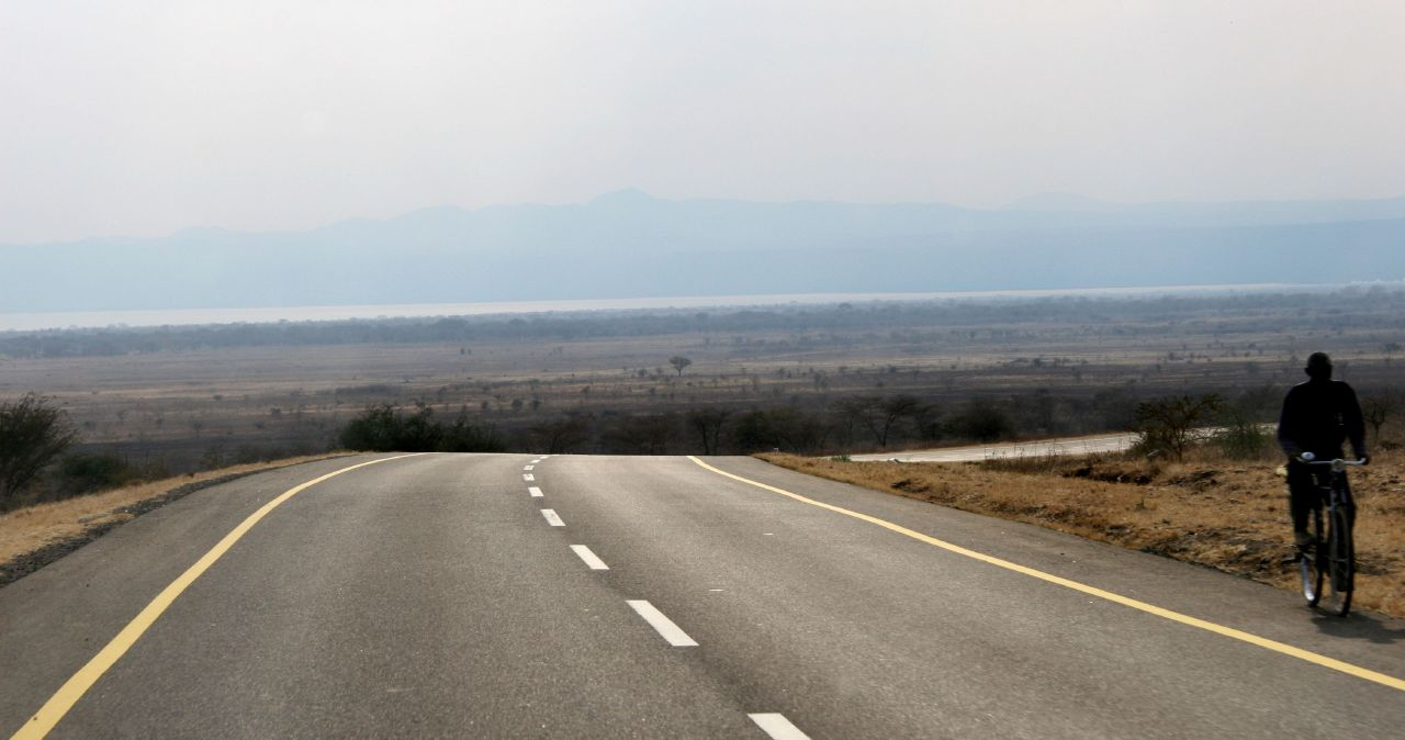 Tanzanie, Route du Ngorongoro. Au fond le lac Manyara